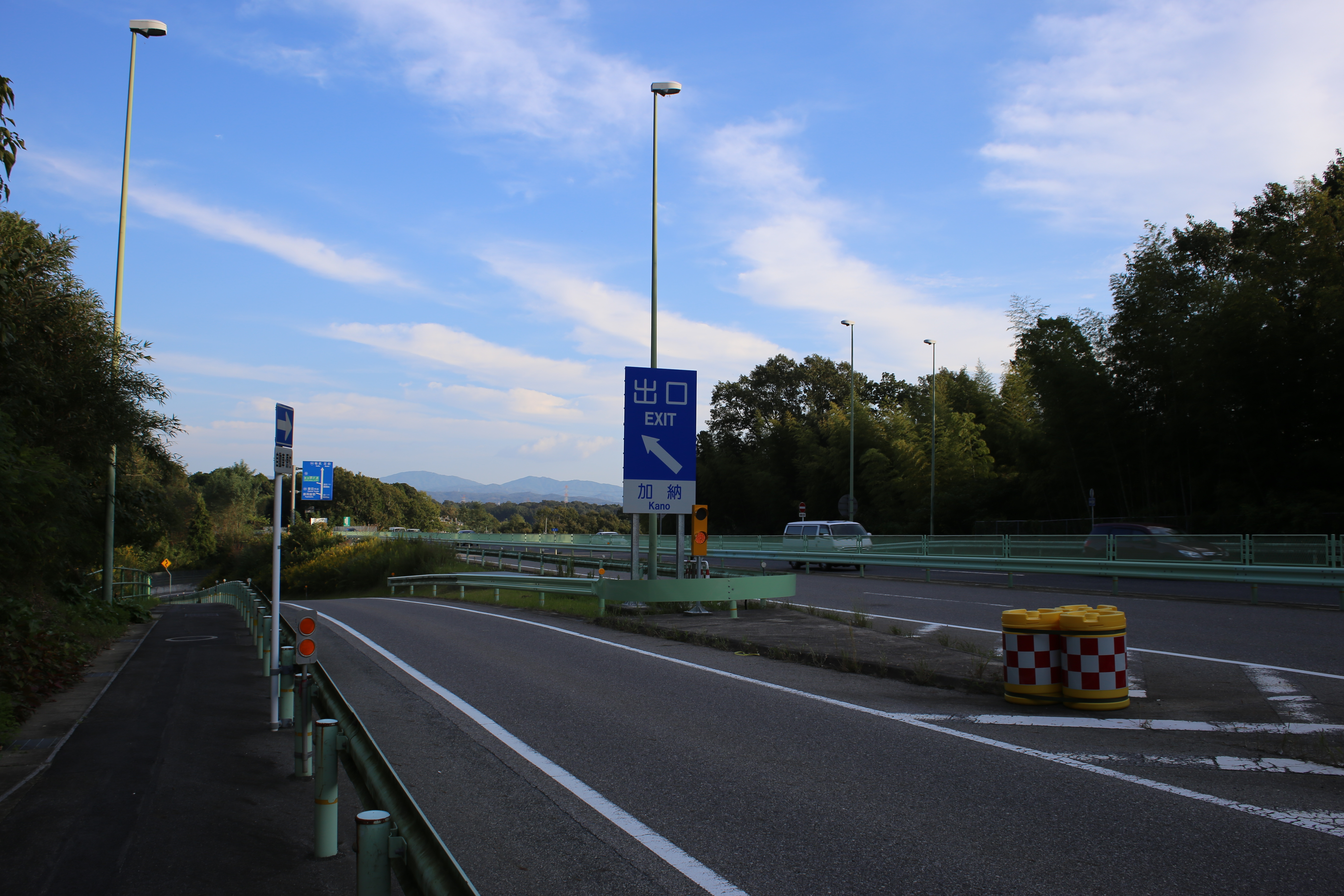 愛知県豊田市加納町の猿投グリーンロード加納インターチェンジ出口